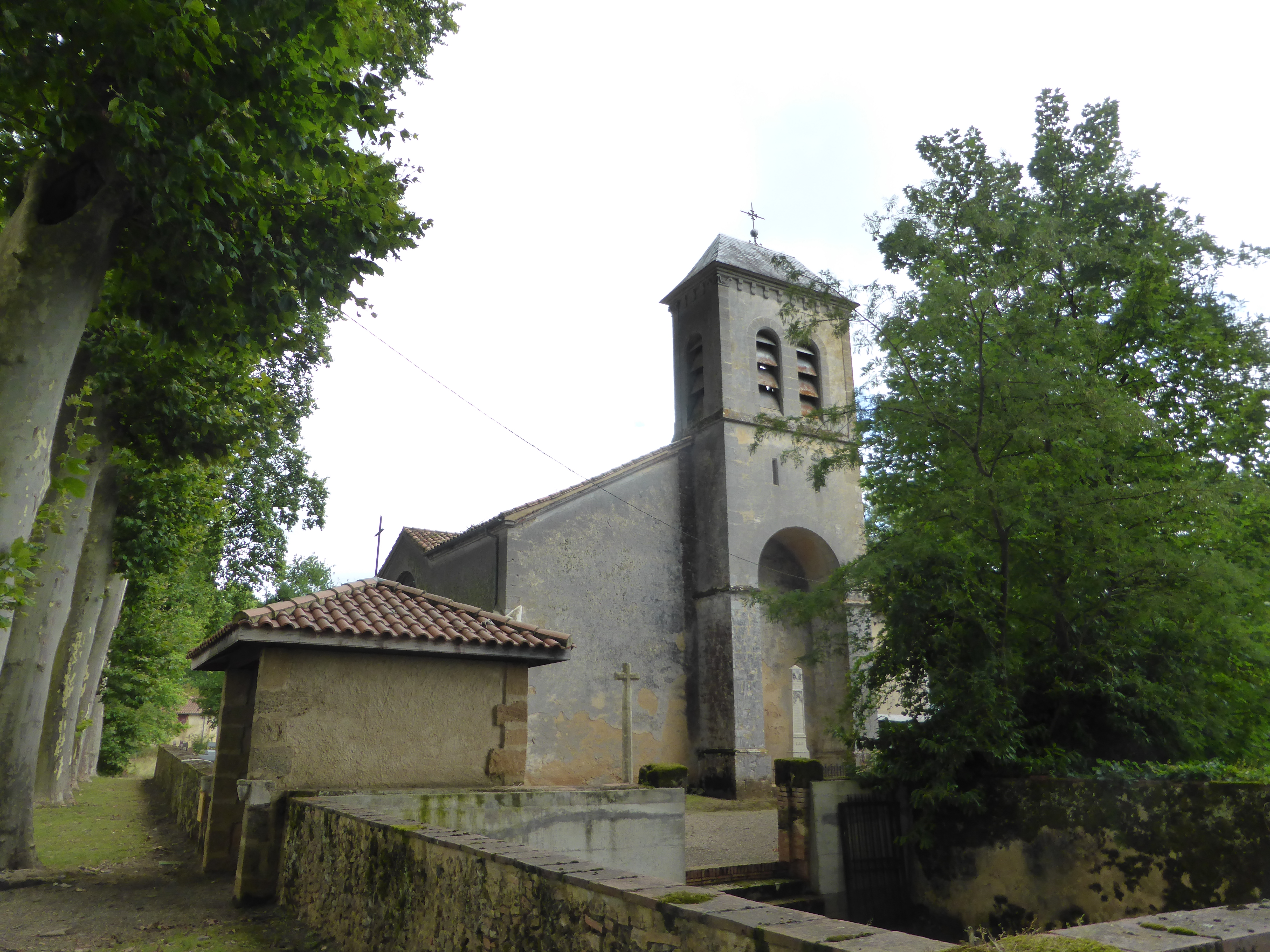 Église Notre-Dame de Castex d'Armagnac, dans le Gers.